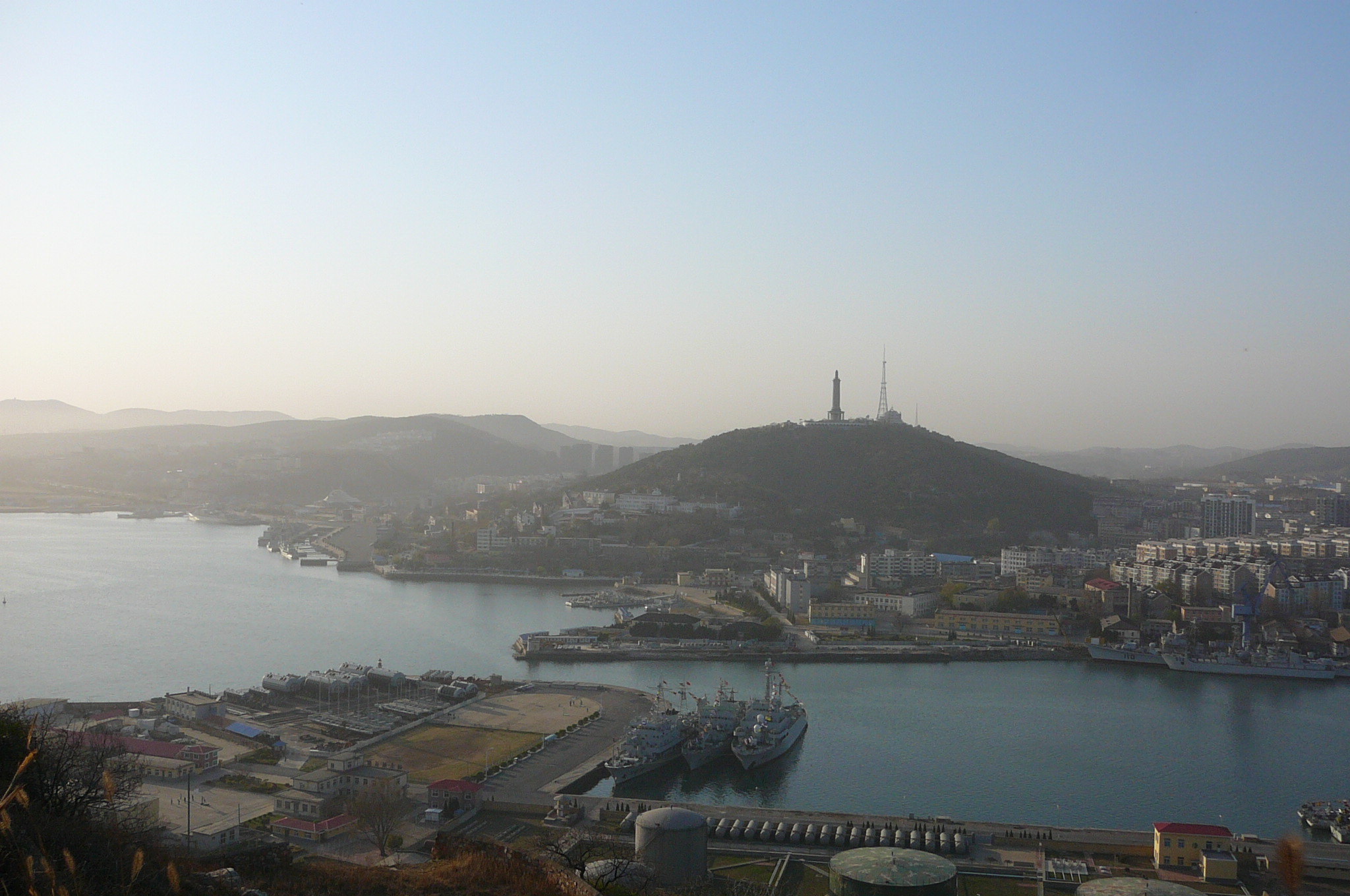 黄金山より望む旅順軍港全景。